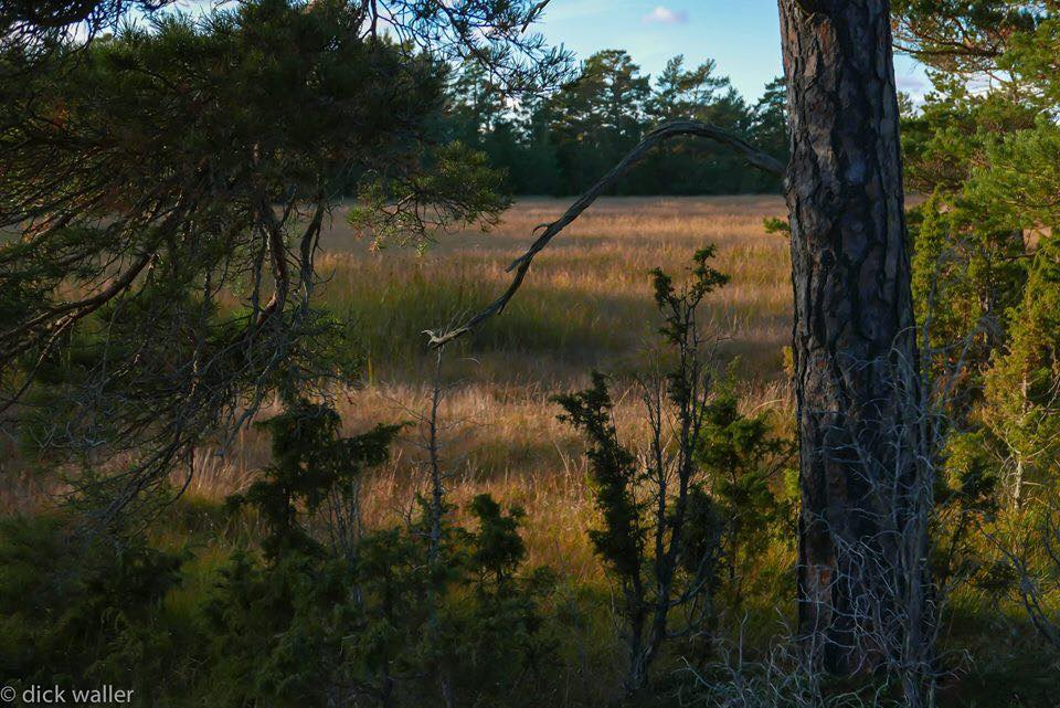 Ojnareskogen, fotograf Dick Waller